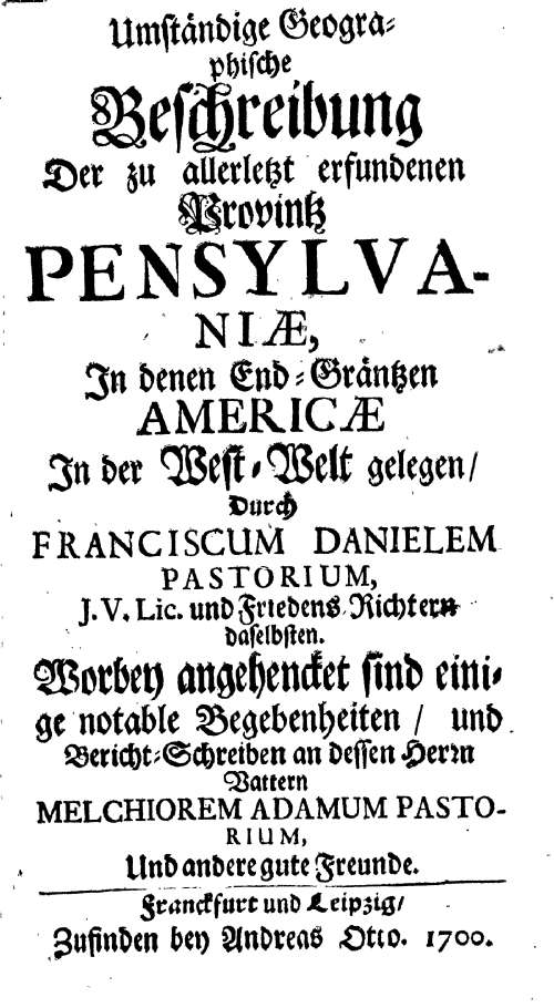 Titelblatt eines seiner Berichte von Nortamerika